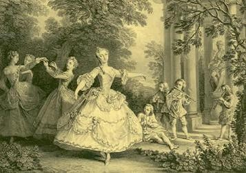 Портрет Марии Салле танцовщица и балетмейстер XVIII века